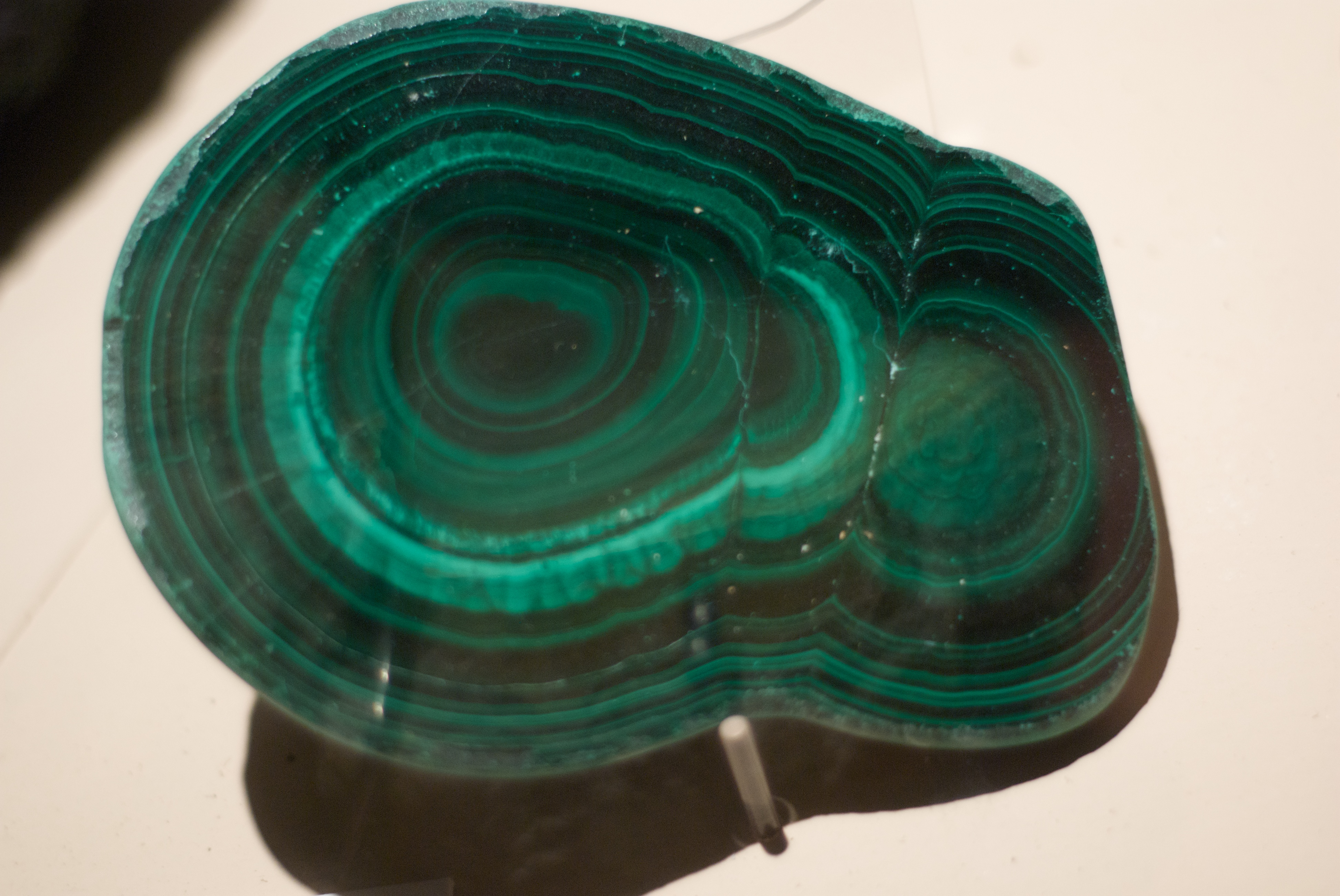 Malaquita, Carbonato de cobre. Katanga, Congo, Africa.